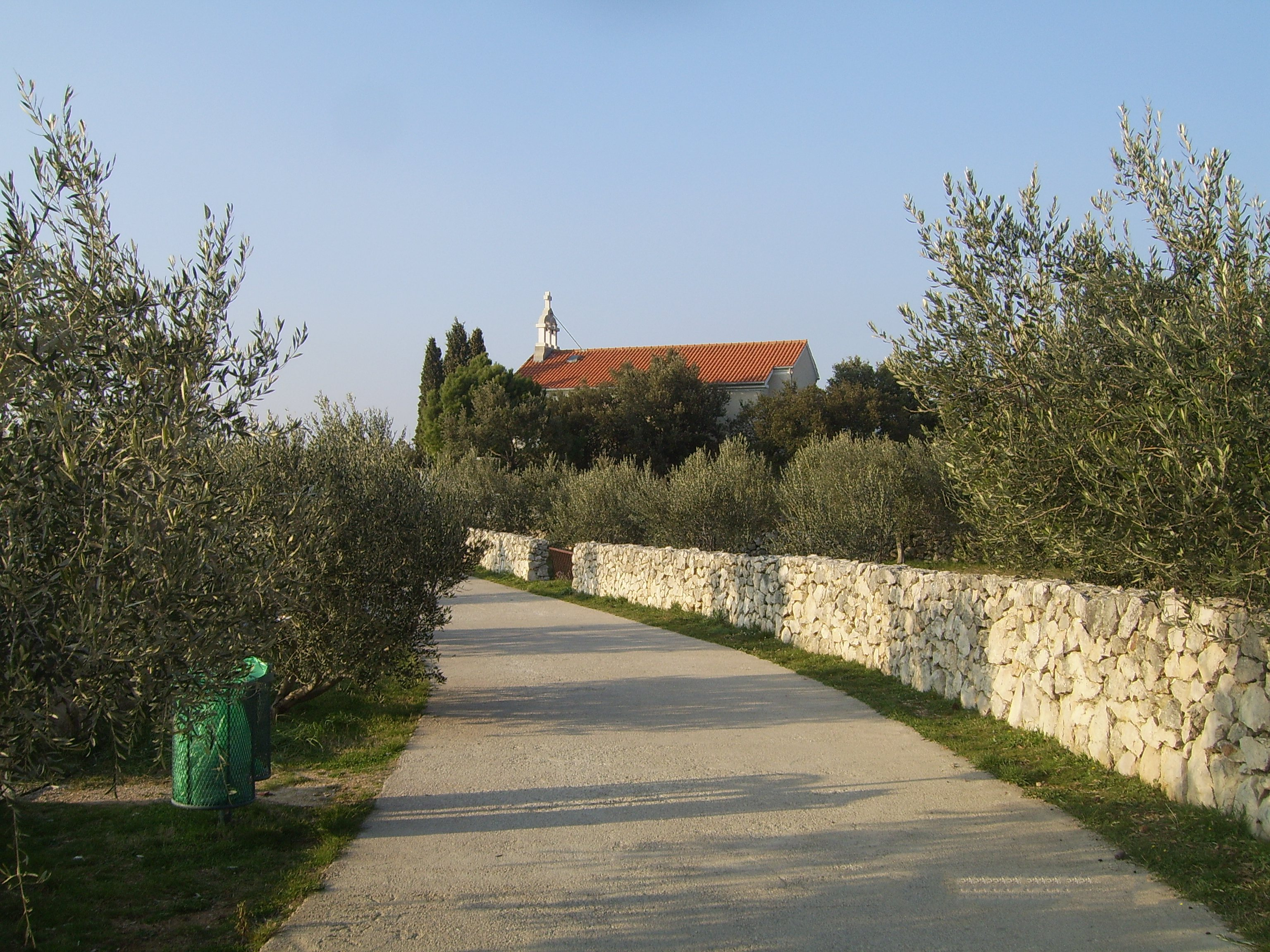 Šetalište (lungomare) Ivana Brusića u Puntu, na Buki. Djelomično se vidi gornji dio crkvice svetog Mikule (Nikole).